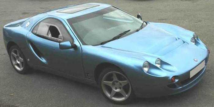 Berlinette